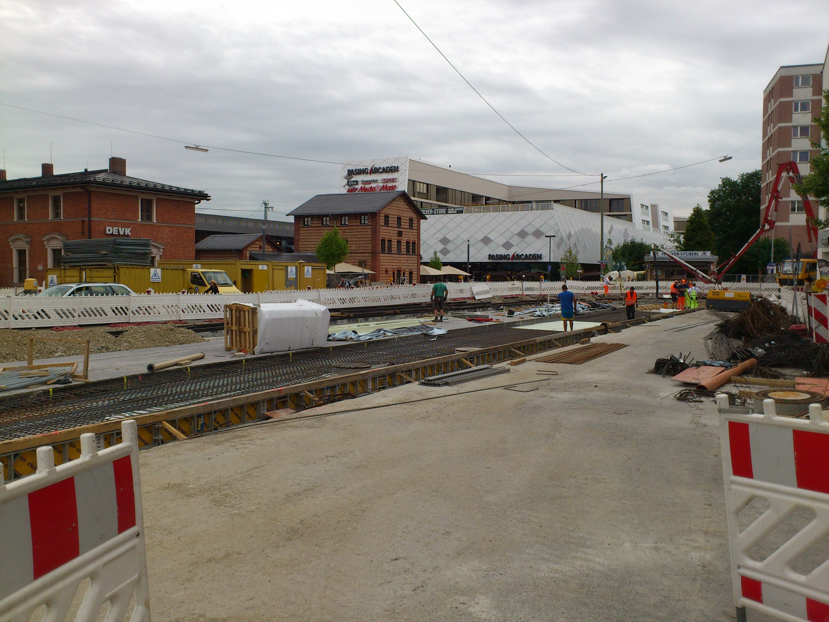 Blick auf die Baustelle vor dem Bahnhof Pasing im Sommer 2013.